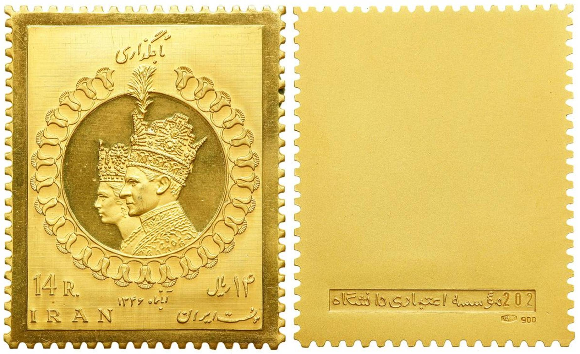 تمبر طلا به مناسبت مراسم تاجگذاری محمدرضا پهلوی به سفارش مؤسسه اعتباری دانشگاه